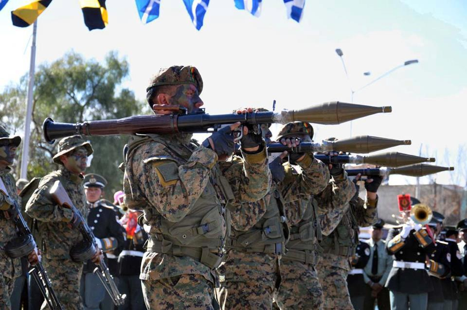 Fuerzas especiales del ejercito boliviano